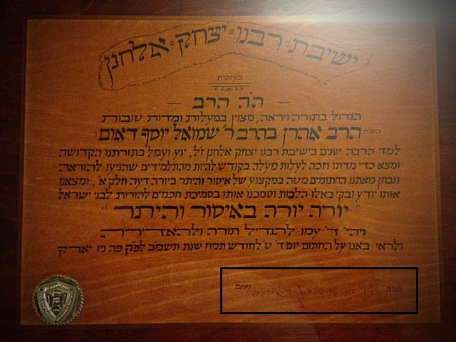 Mano rabino isventinimo diplomas ( Smicha),kuris suteikia man teise atlikti rabino pareigas ir buti religijos mokytoju. Si diploma rabinas J.B. Soloveicikas pasirase paskutini pries pat siaubinga liga, kurios iveikti , deja, jam nepavyko. Te jo sviesus atminimas laimina mus ir visa Izraeli.